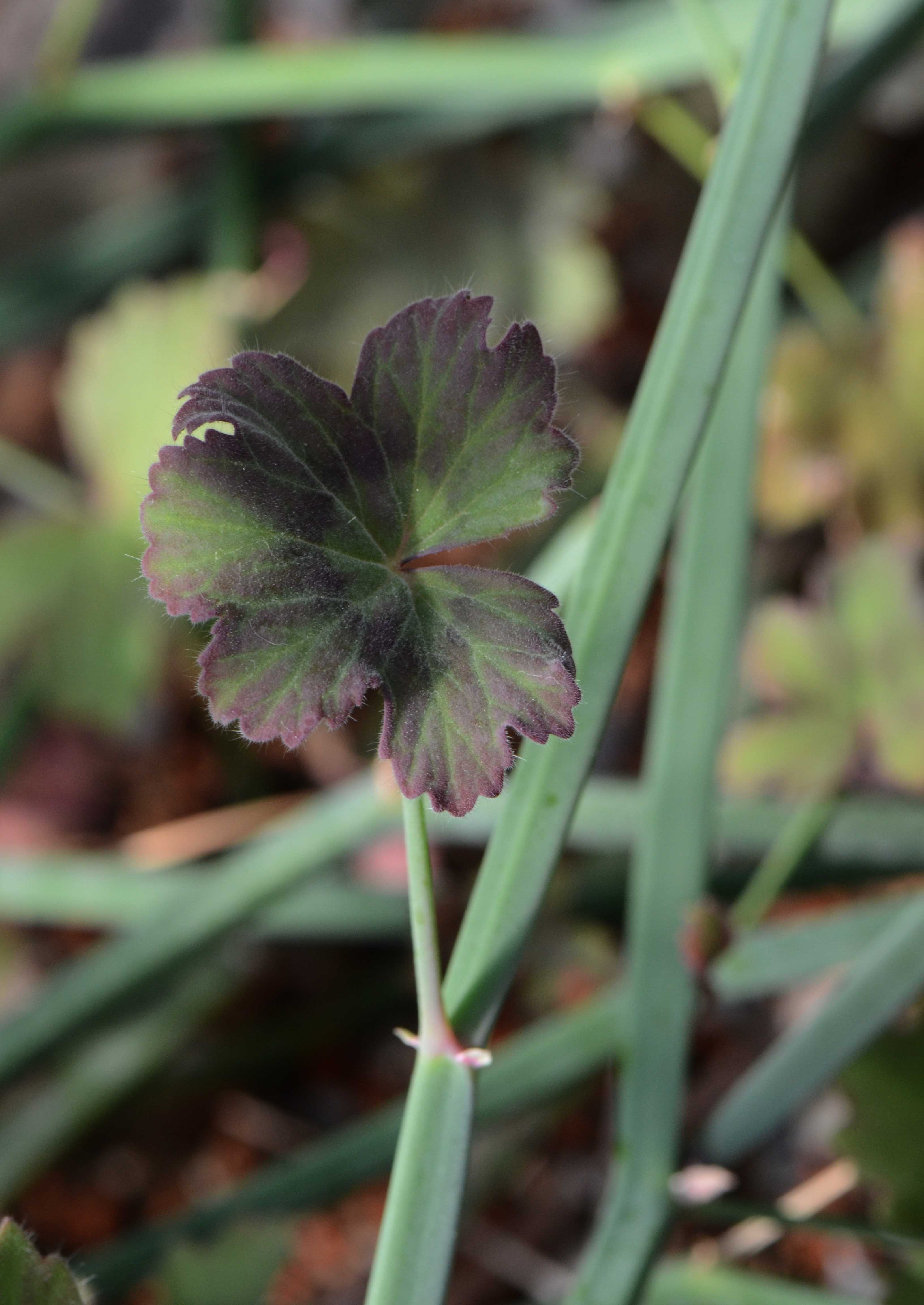 Pelargonium tetragonum, Jardin des Plantes de Paris